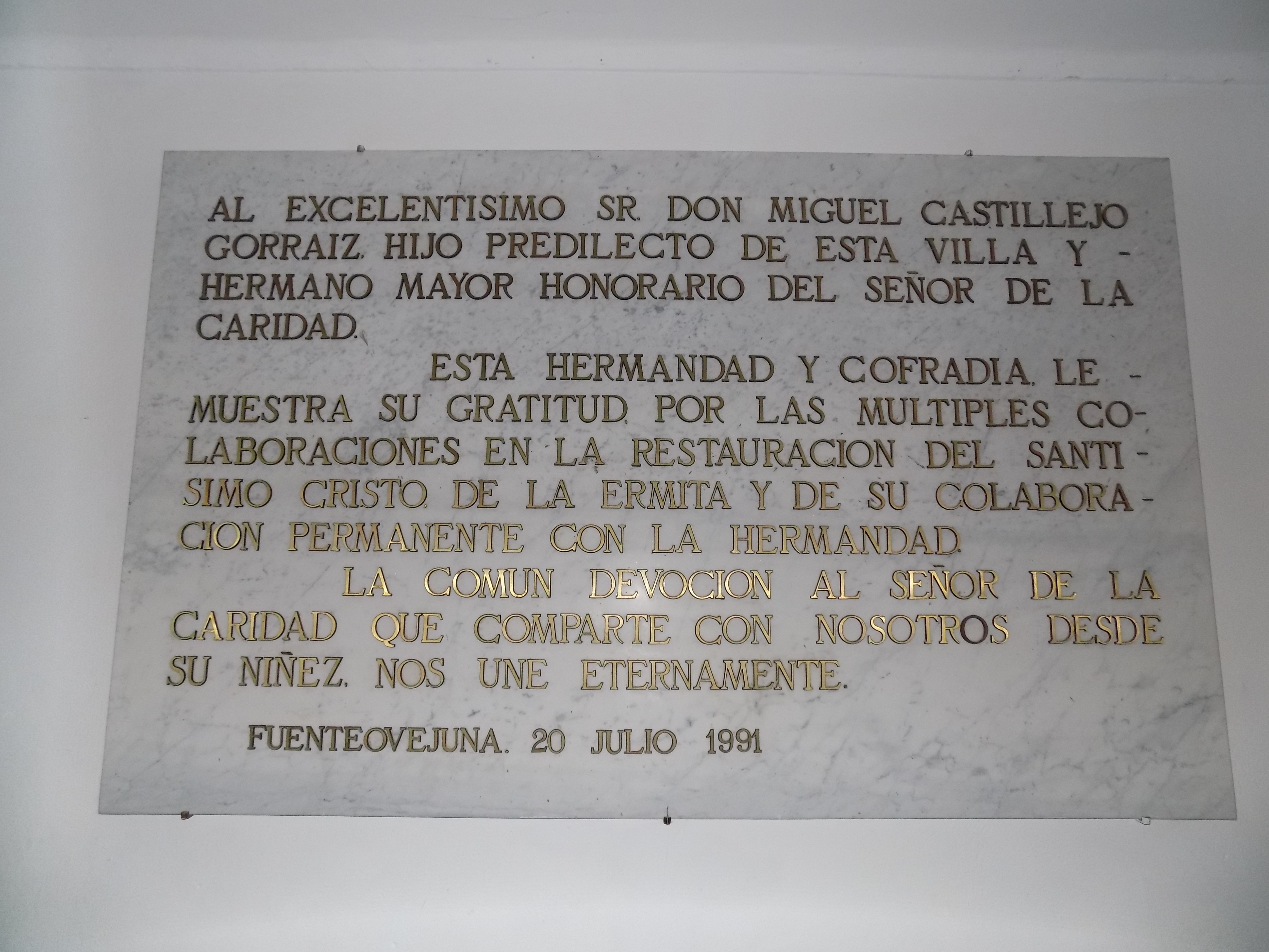 Placa dedicada al sacerdote Miguel Castillejo Gorráiz en el interior de la Ermita de la Caridad de Fuente Obejuna, provincia de Córdoba, (España).